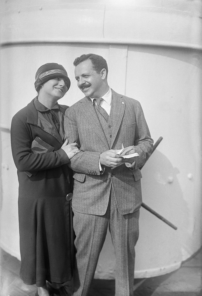 دوریس ای. فلایشمن همسر ادوارد جیمز برنایز نخستین زن متاهل آمریکایی بود که با گذرنامه‌ای سفر کرد که نام‌خانوادگی خودش را داشت.